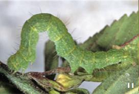 Bagisara repanda larvae